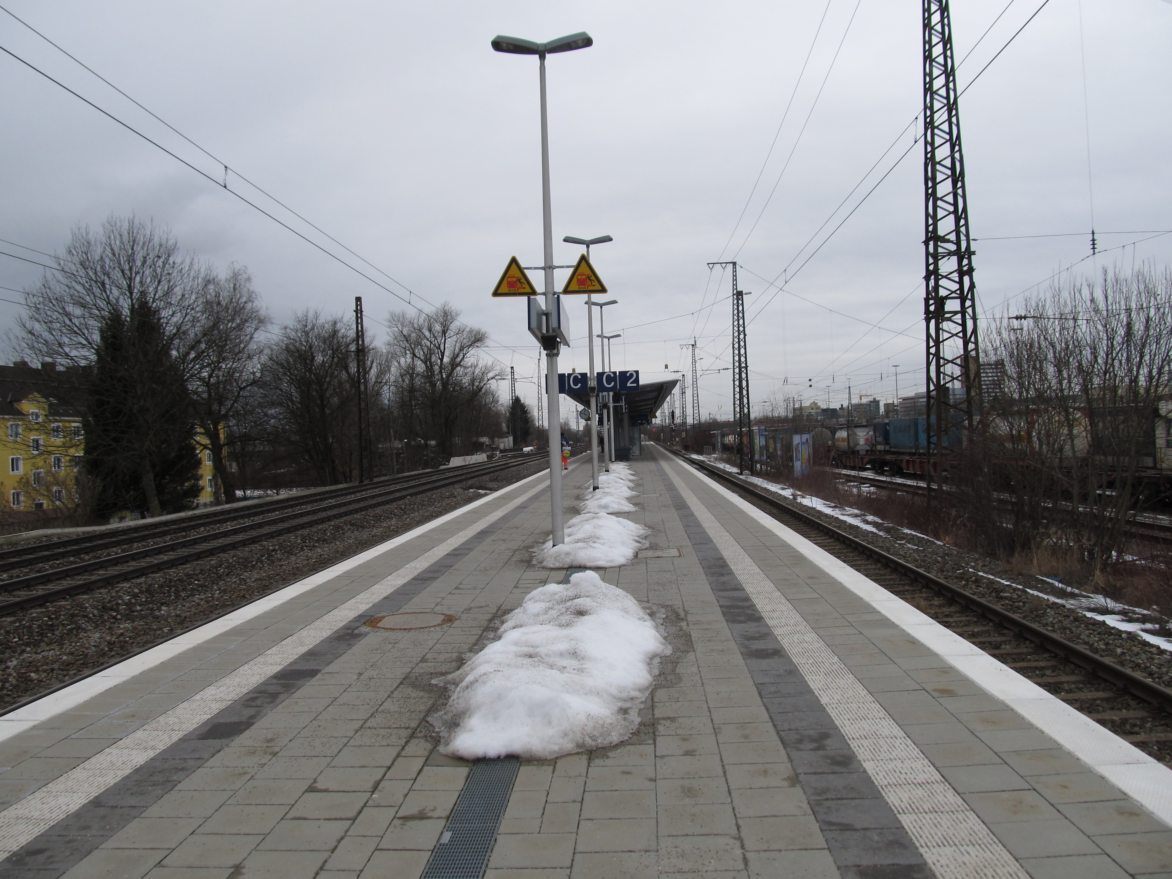 Bahnsteig des Bahnhofes Berg am Laim